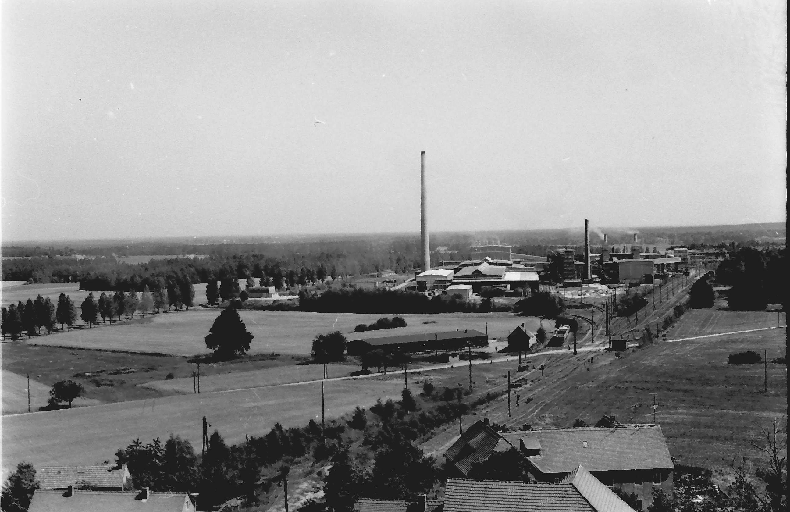 Hornjoserbsce: Zawod a dwórnišćo we Wětrowje, 1976